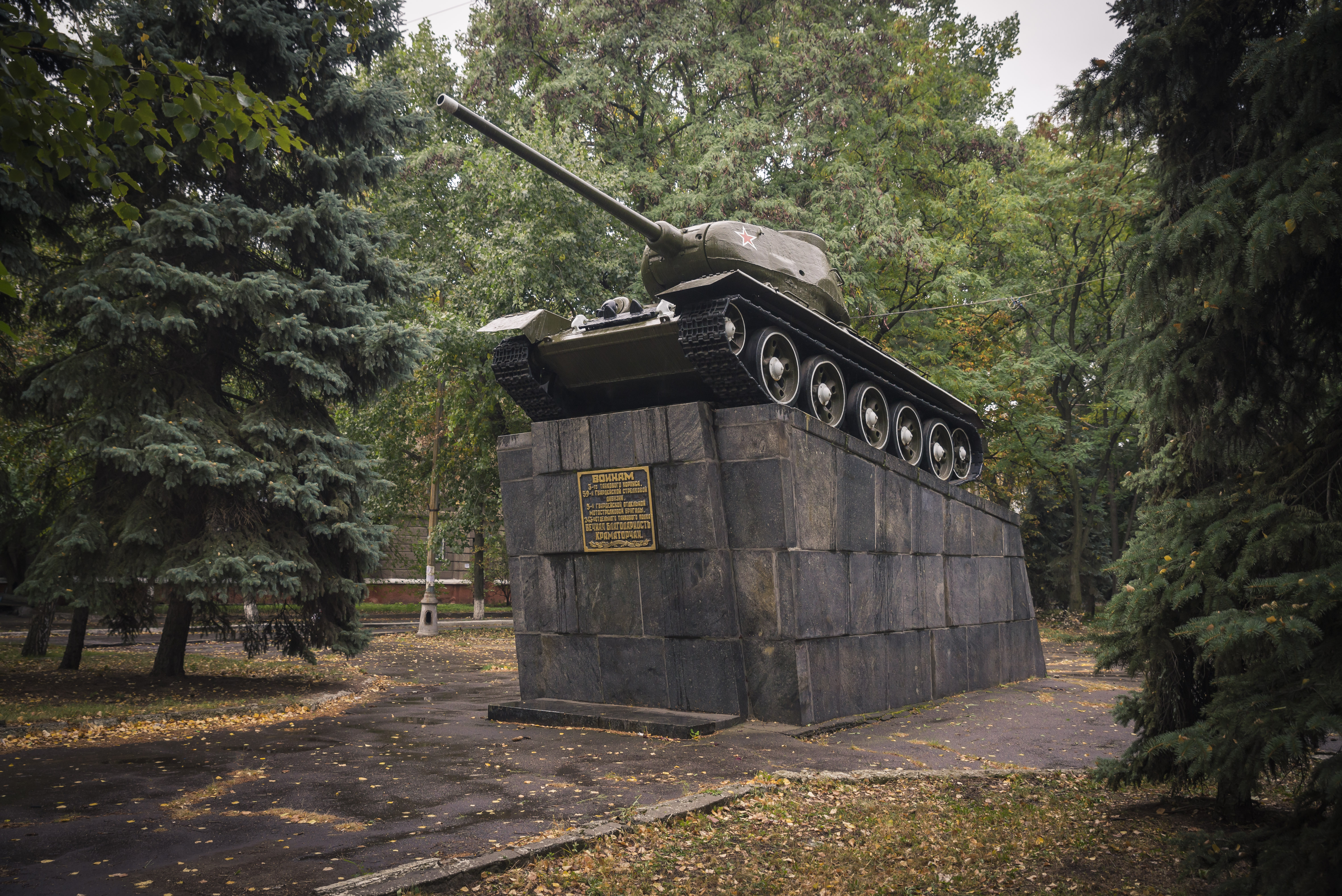 Пам'ятник воїнам-визволителям, Краматорськ, вул. Леніна, 2